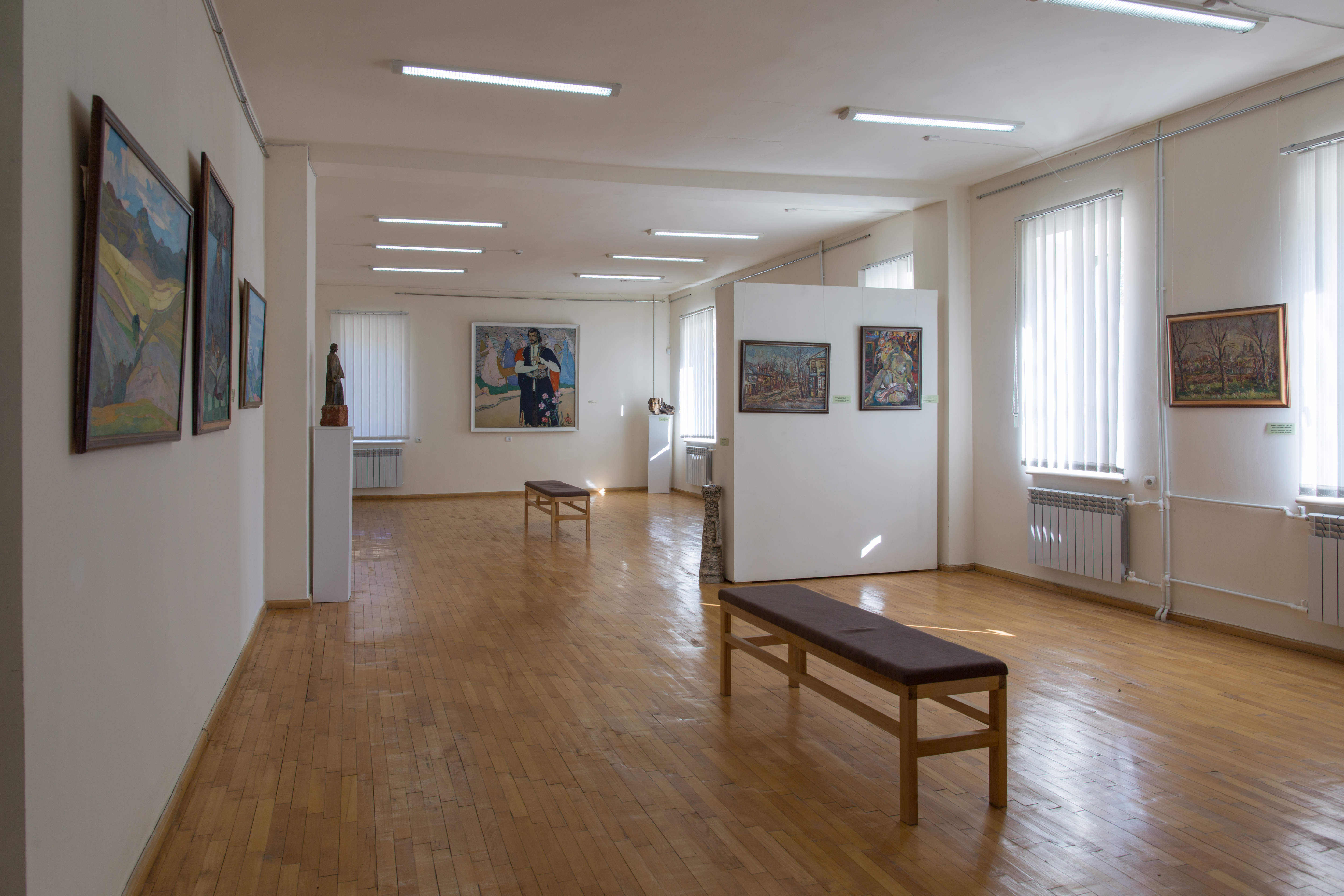 Ջերմուկի պատկերասրահի ցուցասրահներից մեկը, որտեղ ցուցադրվում են հայ գեղանկարիչների նկարներ և քանդակներ։